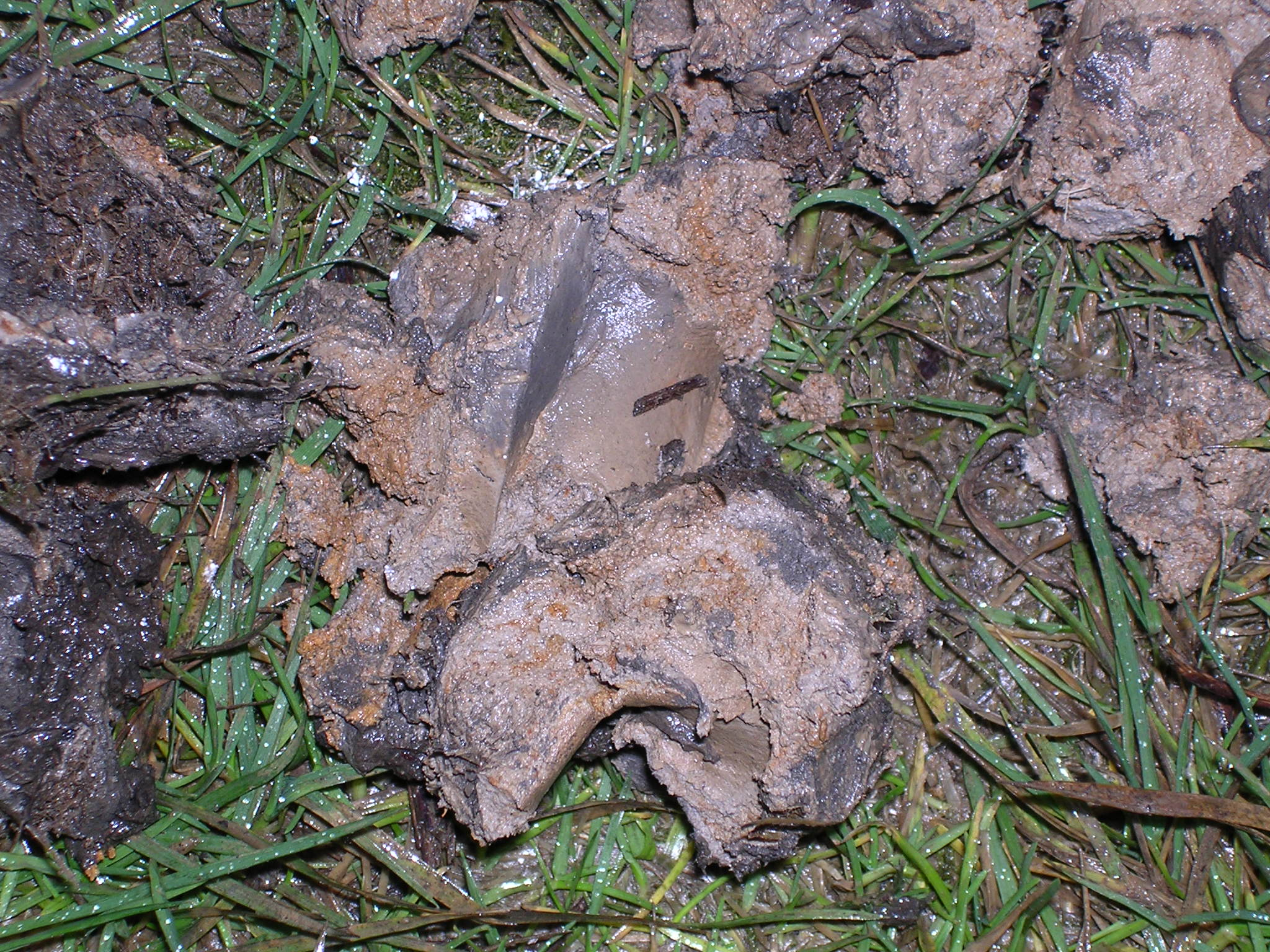 Gley